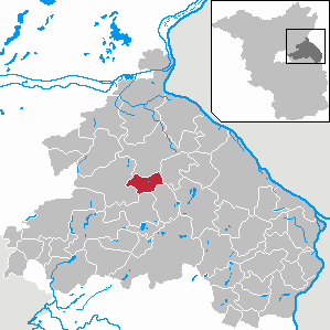 Reichenow-Möglin in Brandenburg (Country) - District Märkisch-Oderland